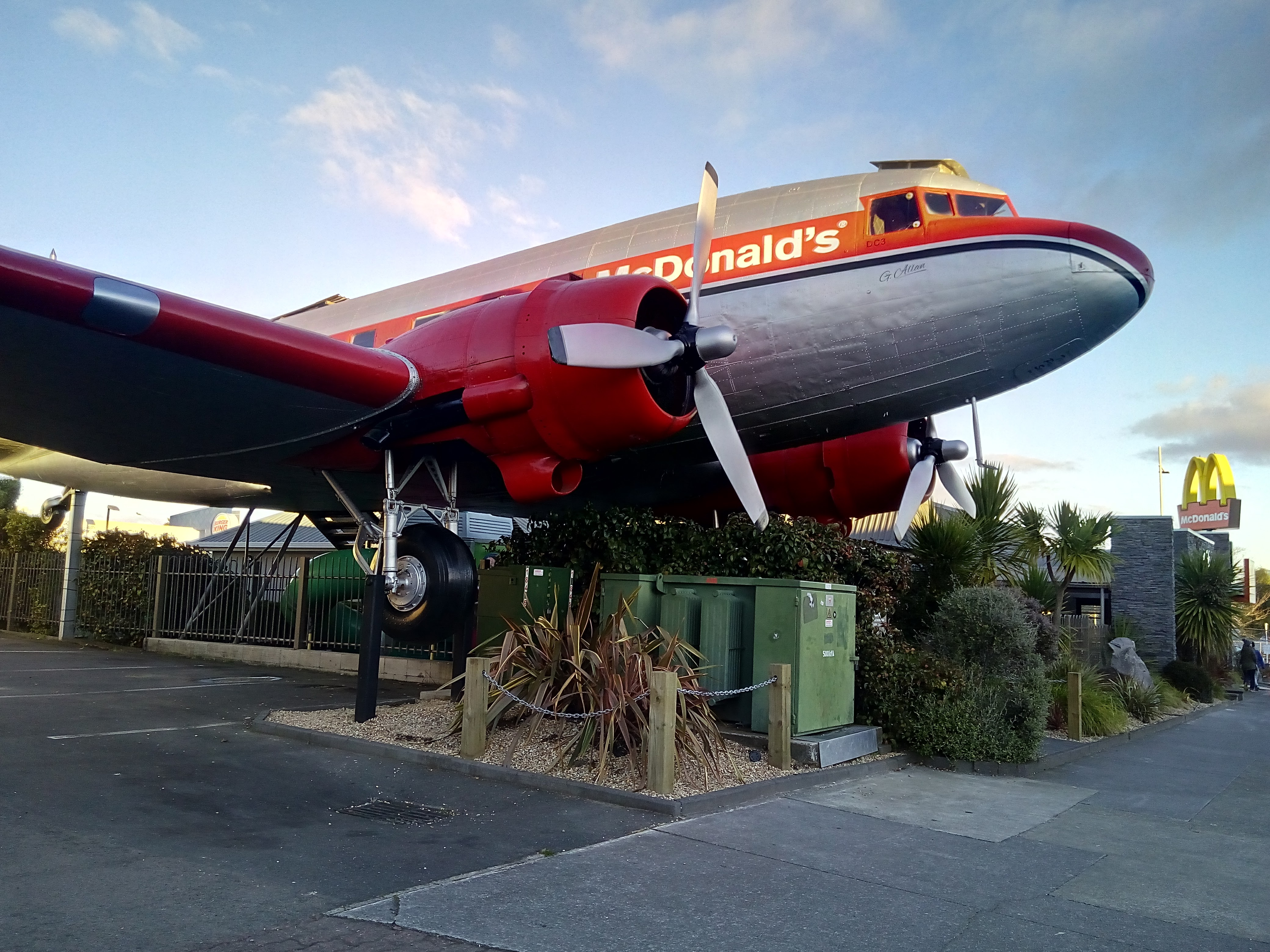 マクドナルド・タウポ店のDC-3